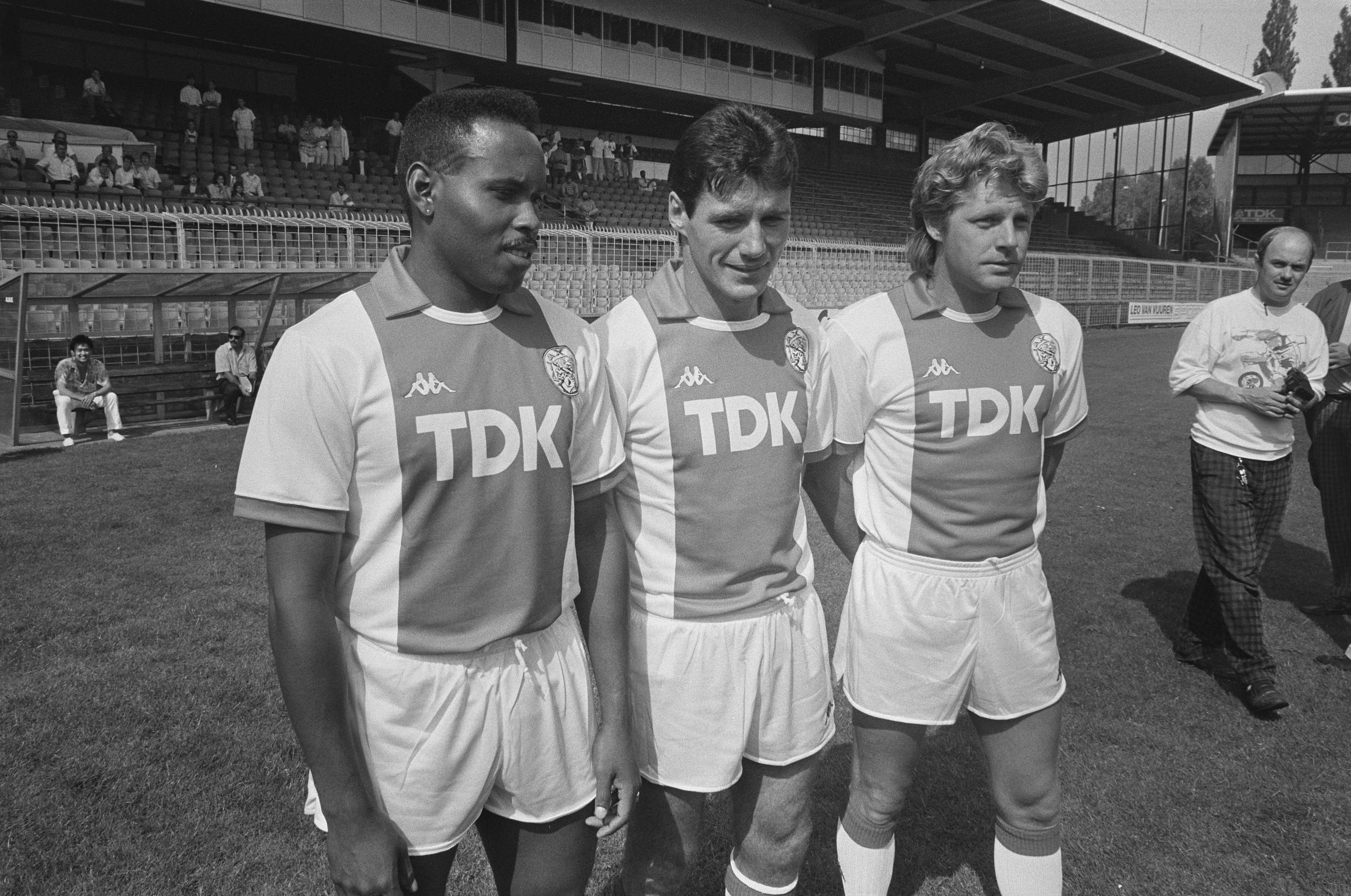 Conférence de presse de l'Ajax. Présentation des nouveaux joueurs du club. De gauche à droite Hennie Meijer, Frank Stapleton et Jan Sørensen. Photographie par Bart Molendijk / Anefo.